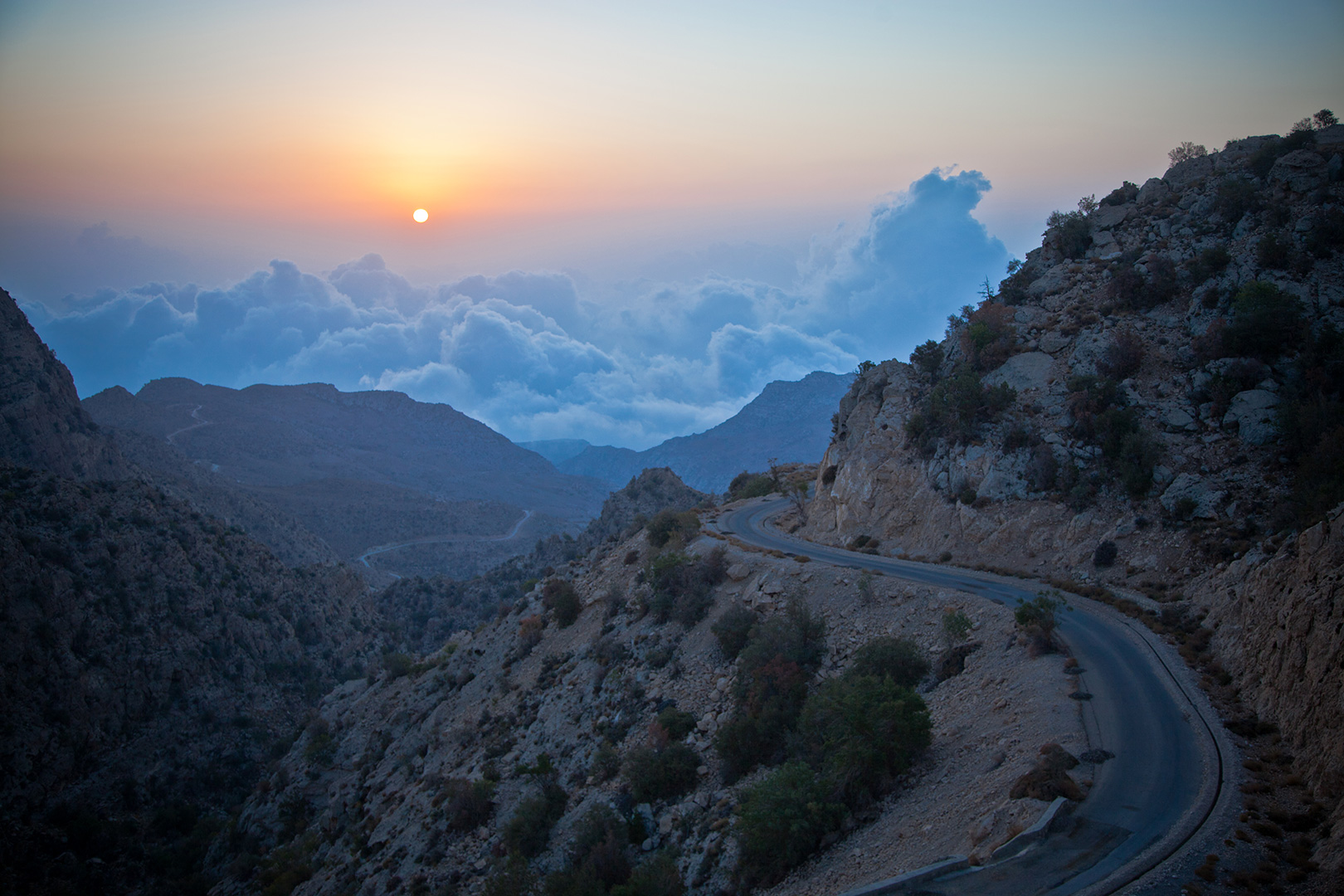 منطقه حفاظت‌شده گنو